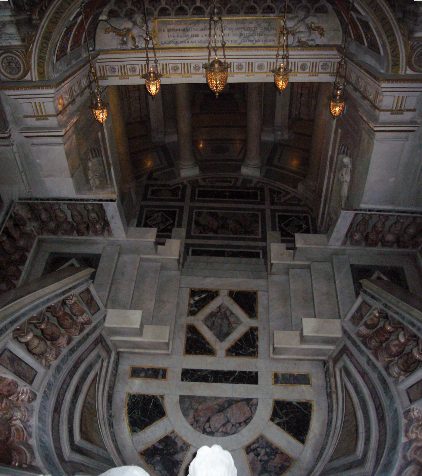 Roma, basilica dei Santi Apostoli: ingresso alla cripta